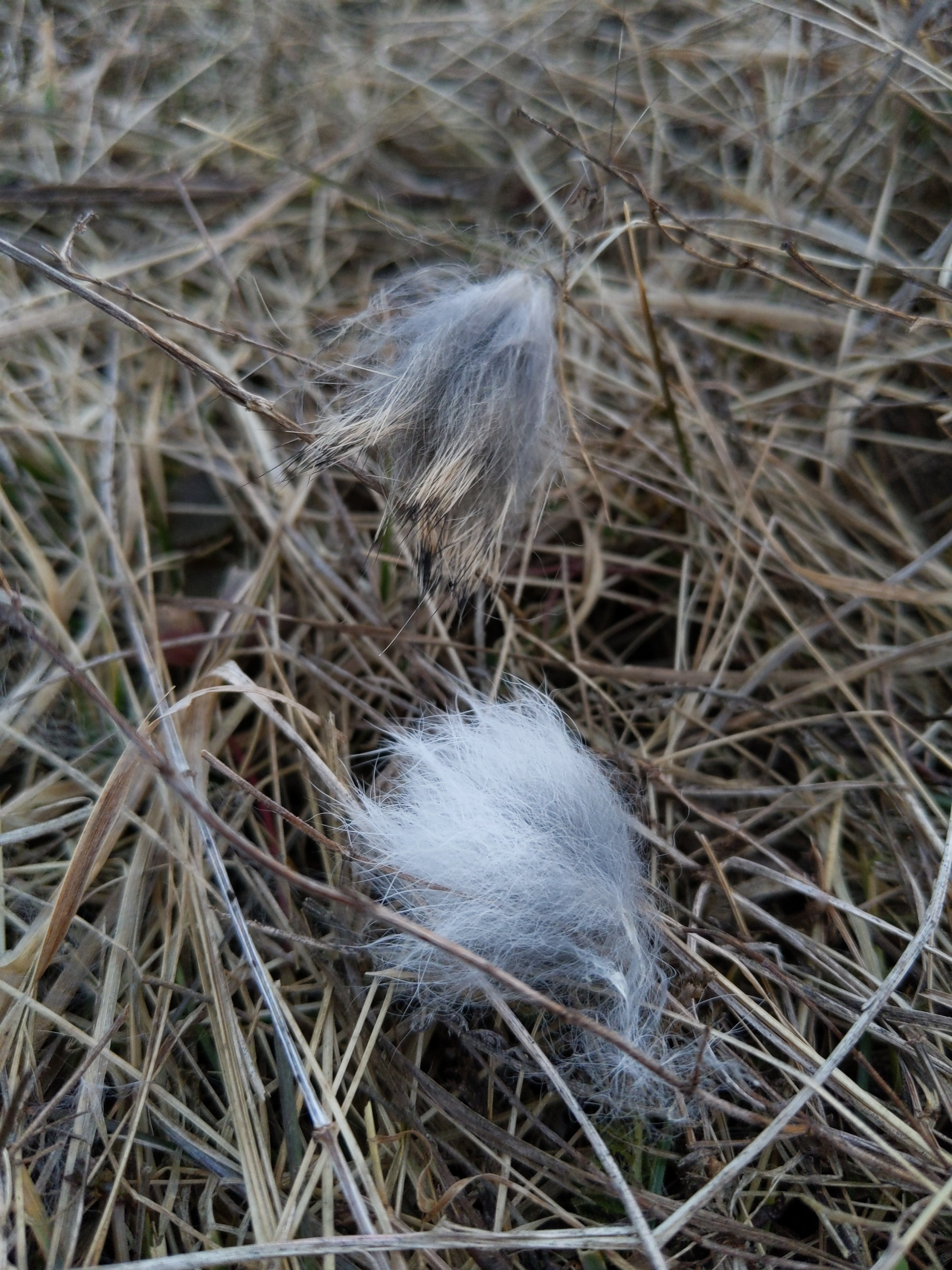 Rammelwolle eines Feldhasen. Die Haarlänge beträgt ca. 20 bis 30 mm.